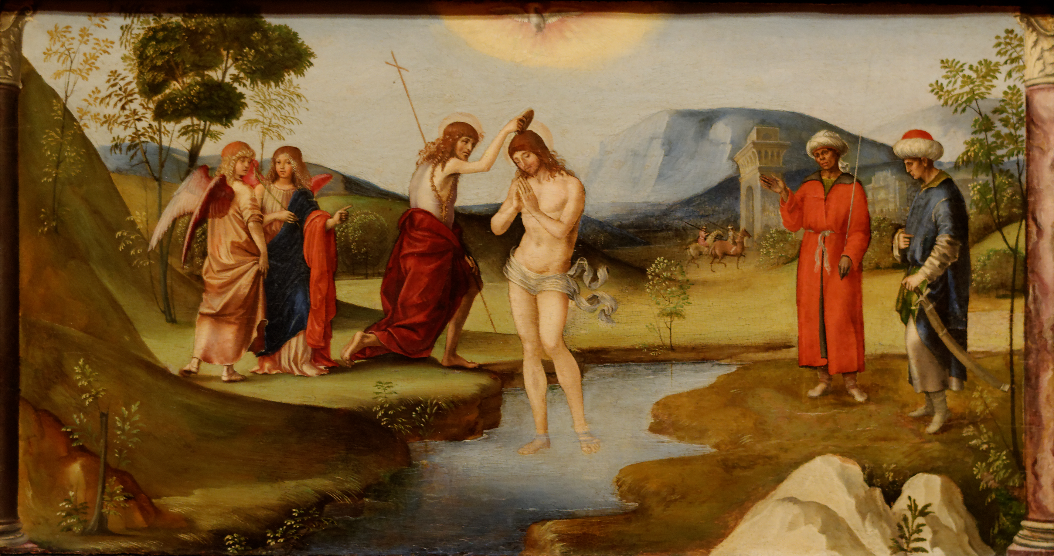 Le baptême du Christ, Francesco Francia, Bologne 1490. Huile sur bois exposée au musée Calouste Gulbenkian, Lisbonne. Inv 2358.